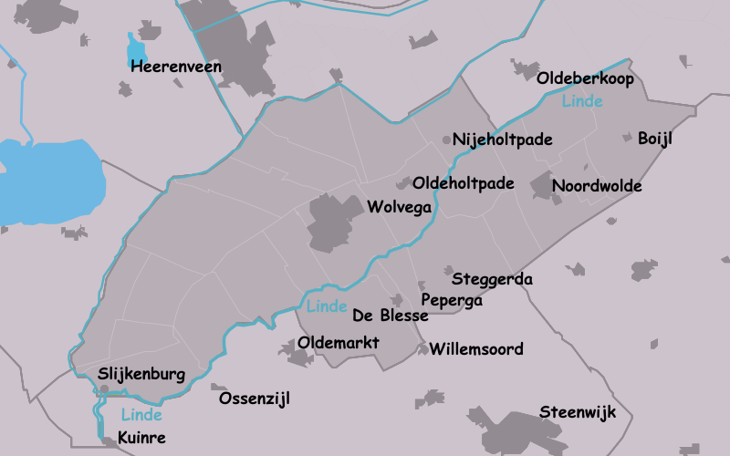 Linde aangeven op gemeente kaart van Weste Stellingwerf